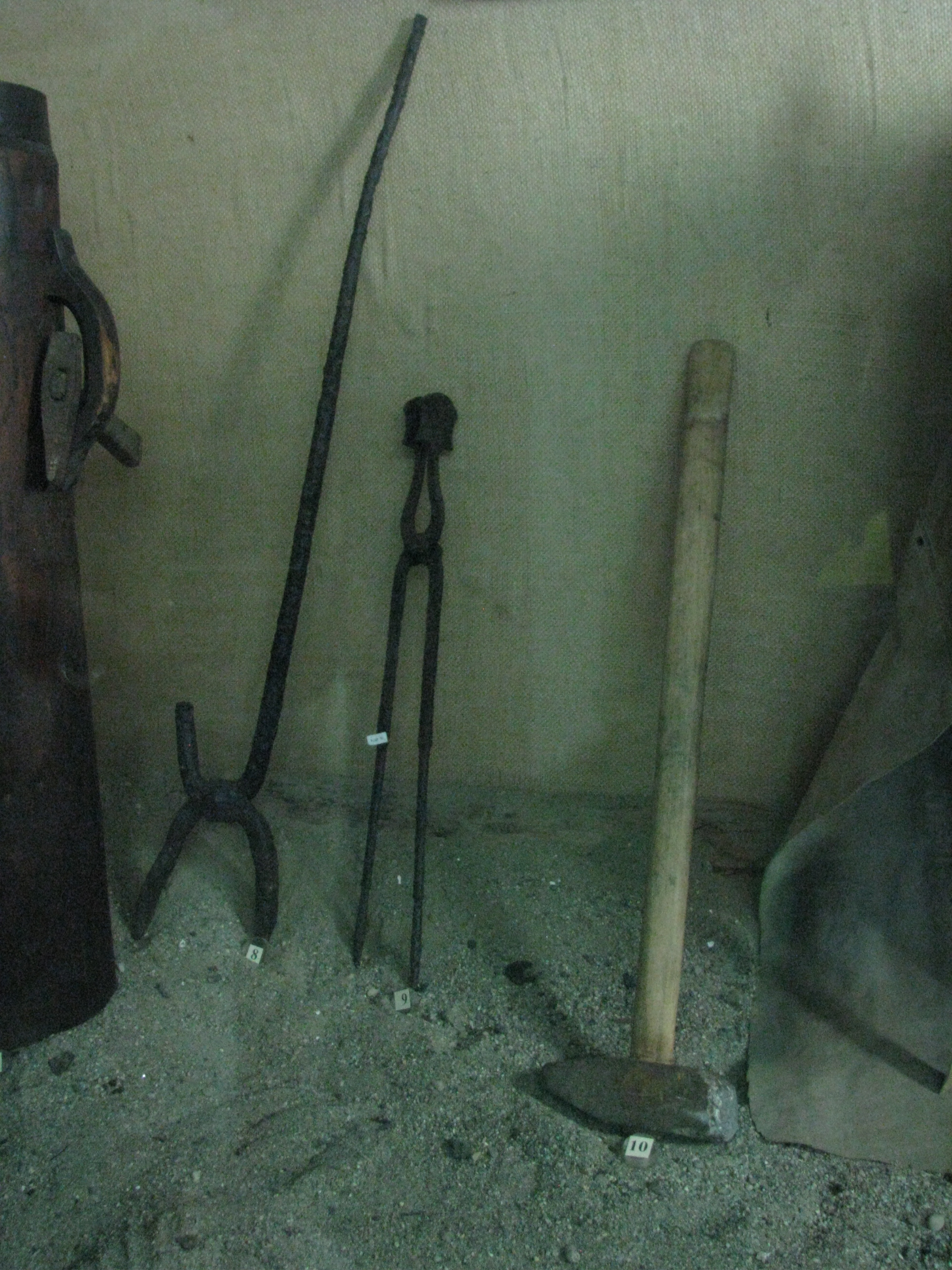 Orăştie Ethnography Museum 2011